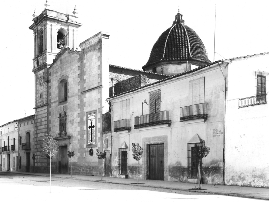 Iglesia Parroquial de Sant Antoni y "Casa Vives"